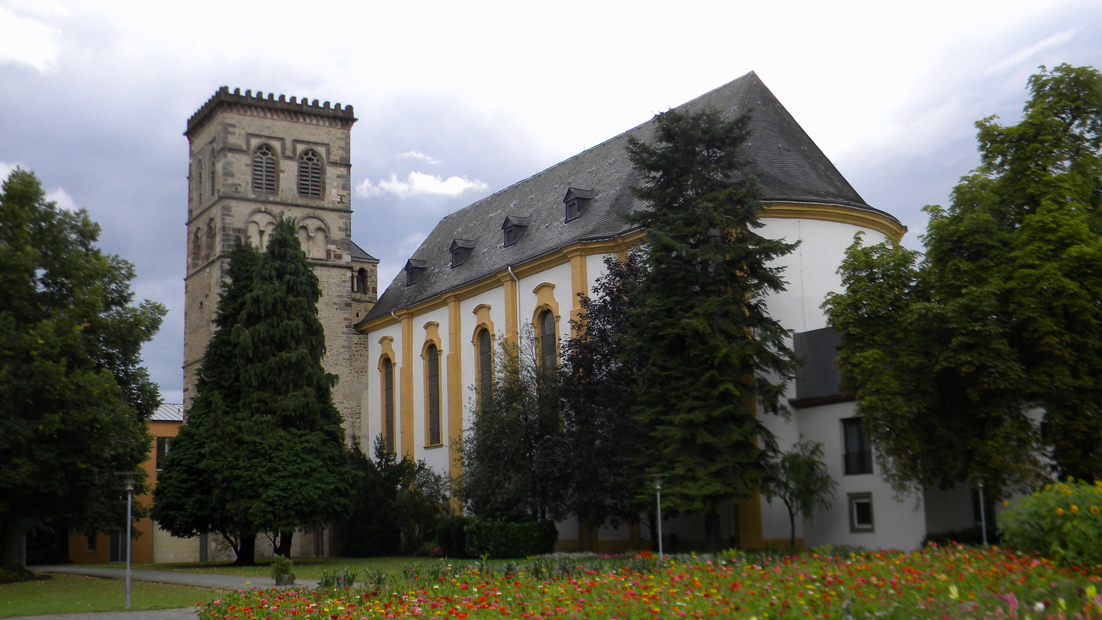 Trier, Barockkirche